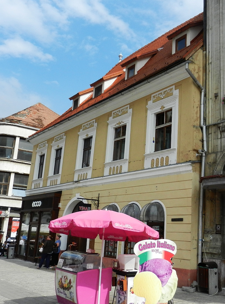 Locuință și spațiu comercial